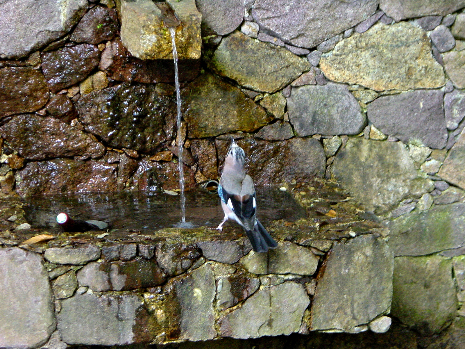 Calenzana (Corse) - Geai se désaltérant à la fontaine de Bonifatu